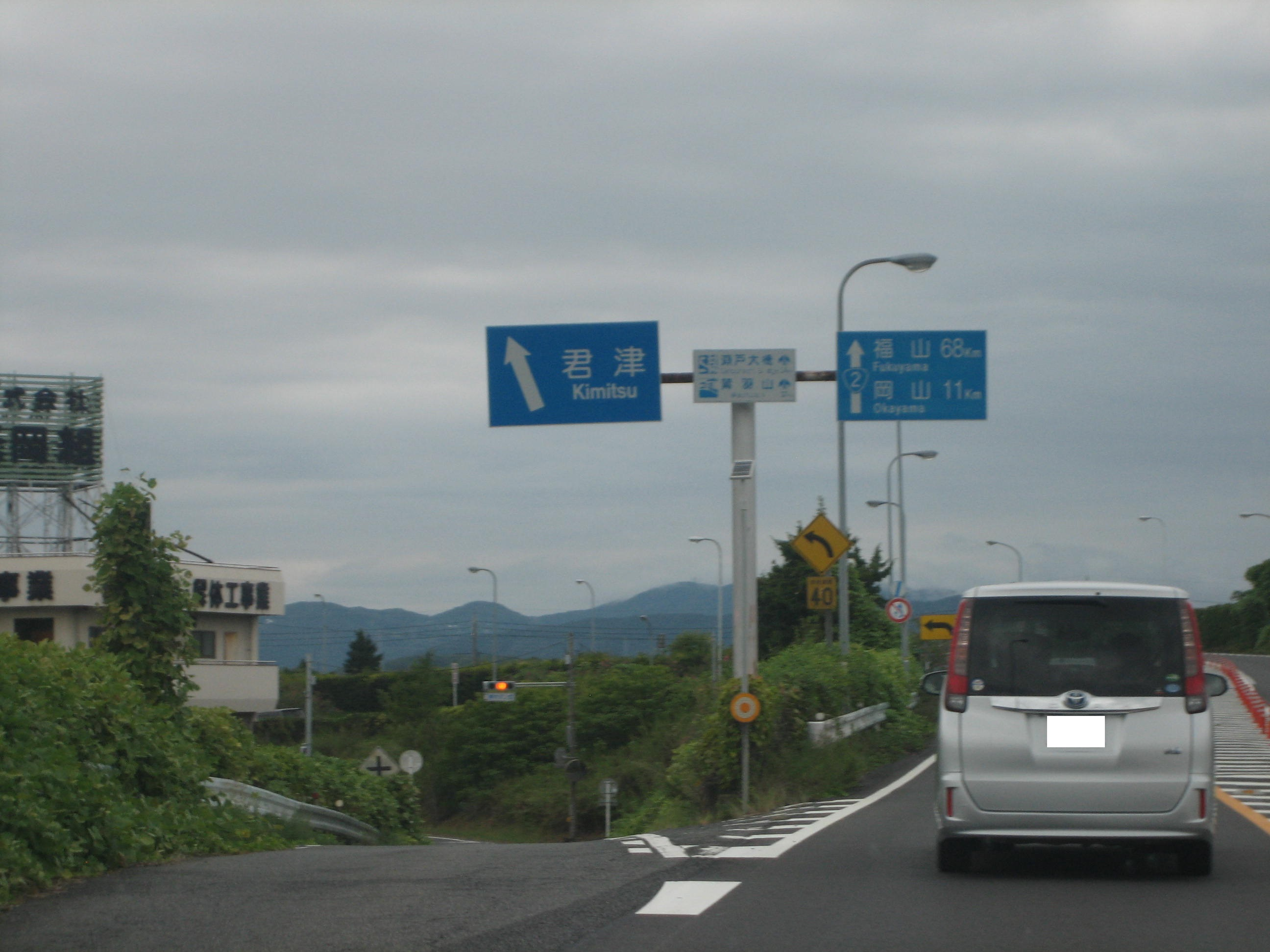 岡山ブルーライン・君津IC。下り線出口。